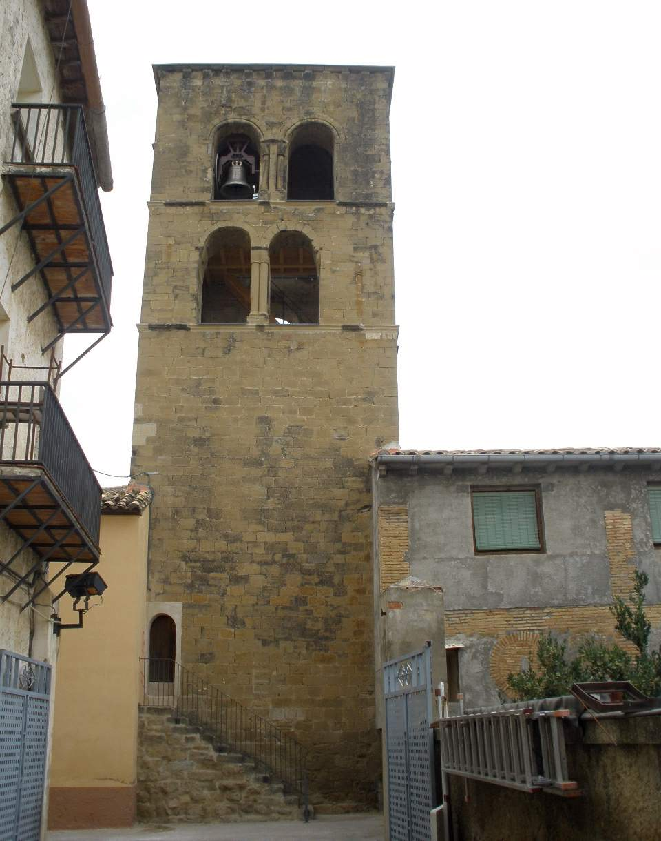 Ayerbe (Huesca) - Torre románica de la desaparecida Colegiata de San Pedro